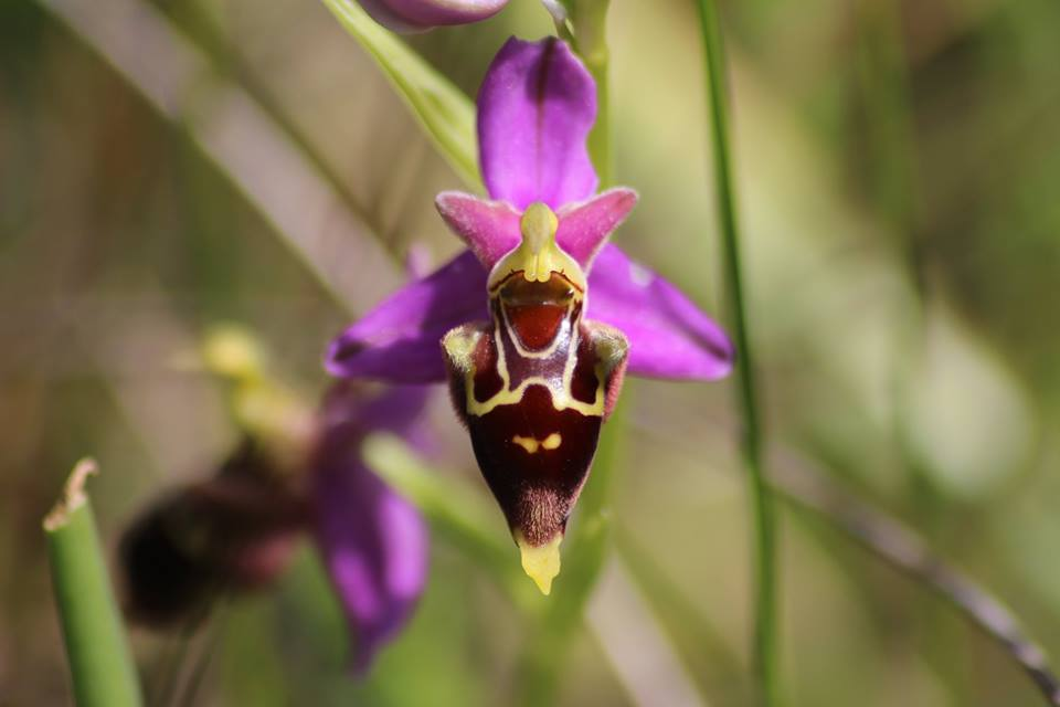 L'ibrido O. xalbertiana nothosubsp. Grovesii